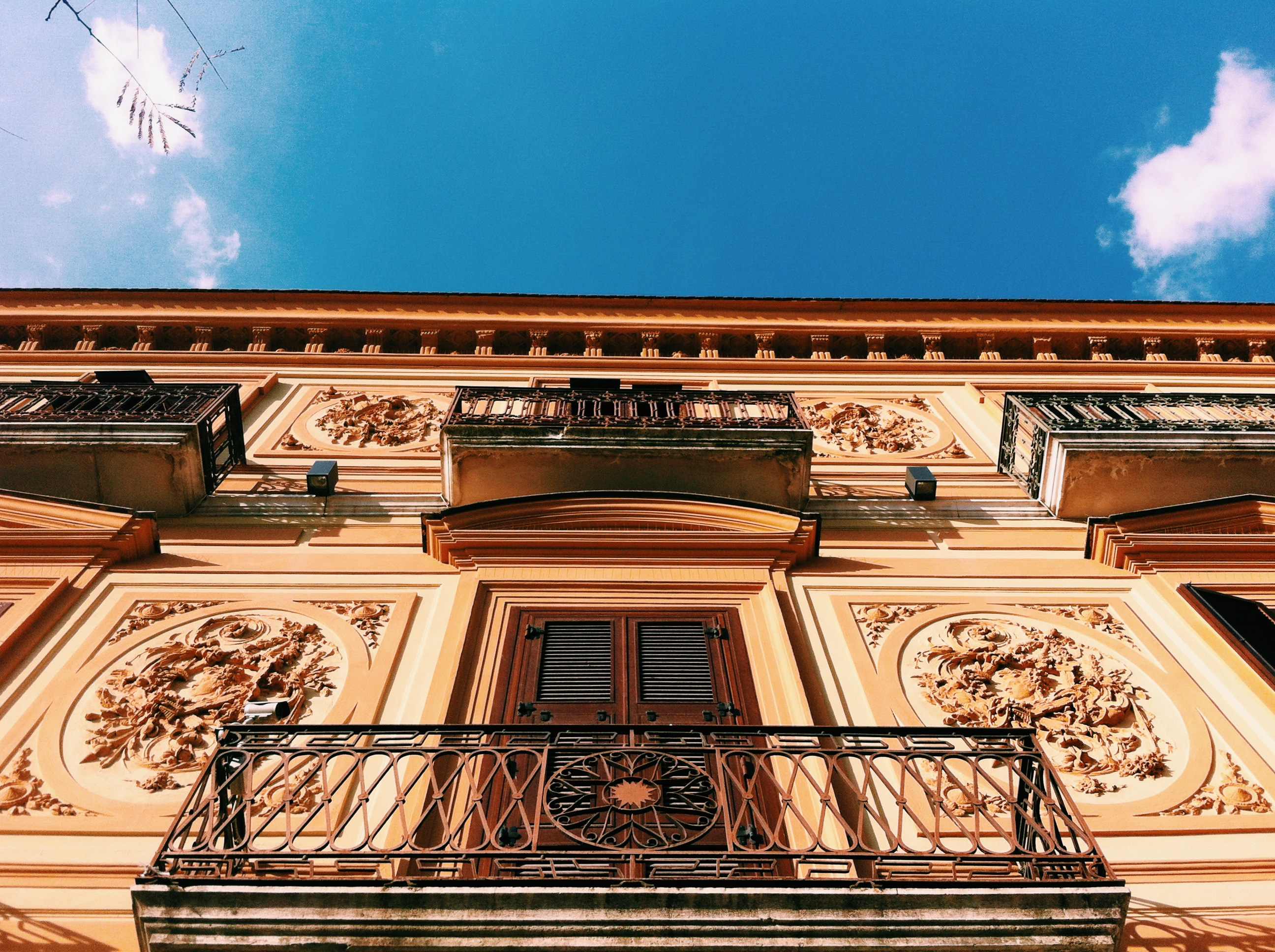 Zona Pedonale,Foggia